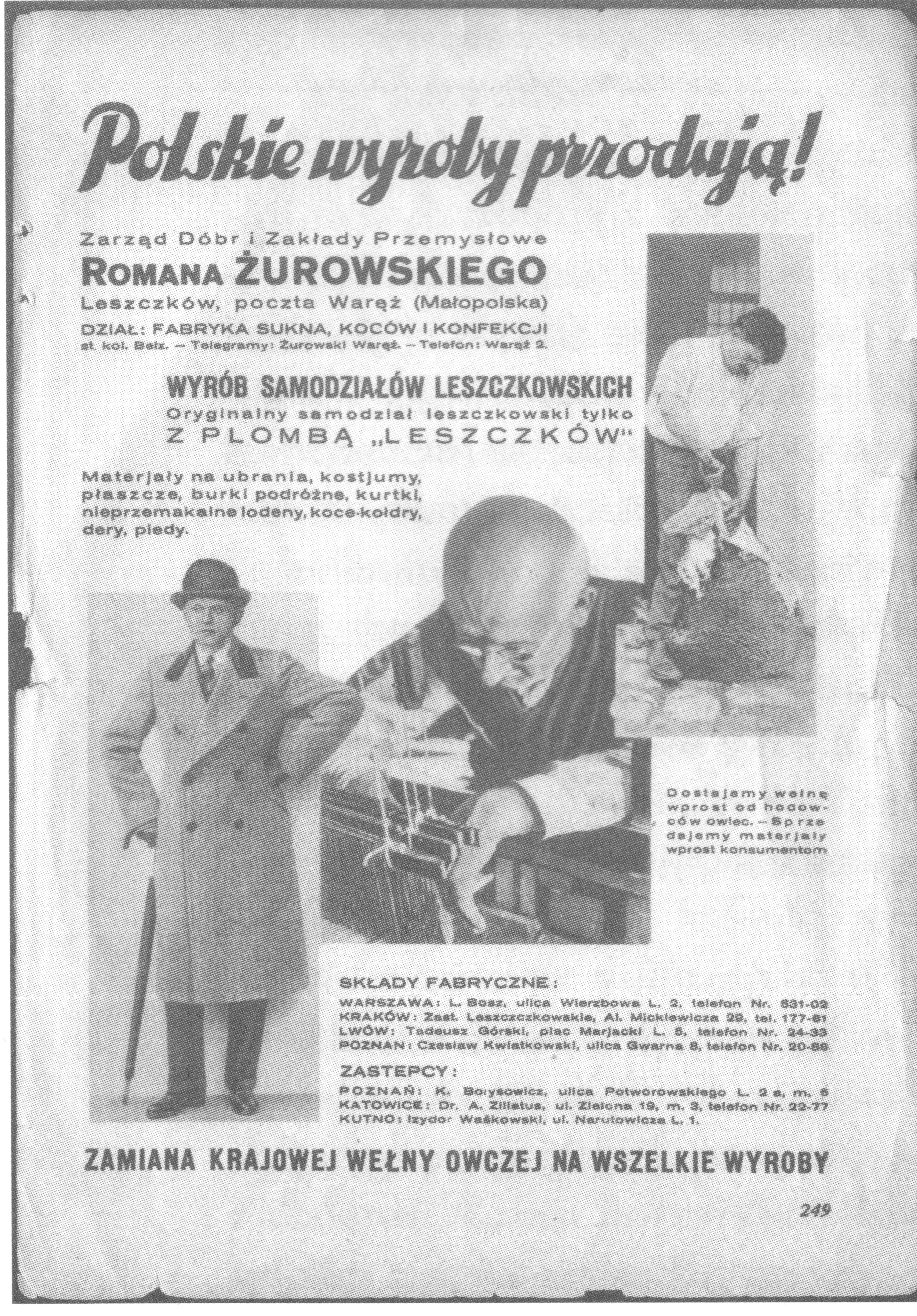 Reklama firmy Leszczków w prasie międzywojennej.